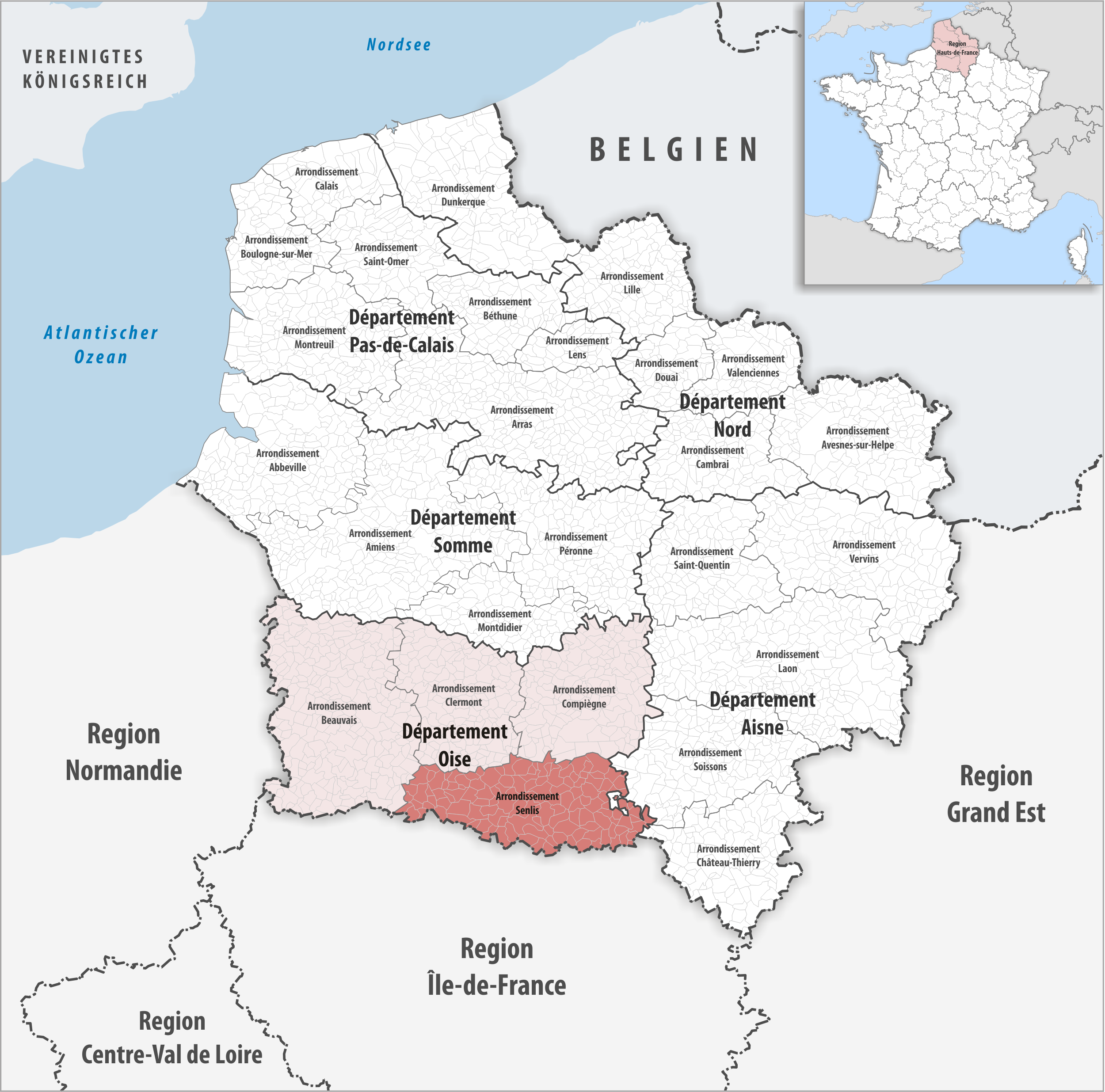 Lage des Arrondissements Senlis